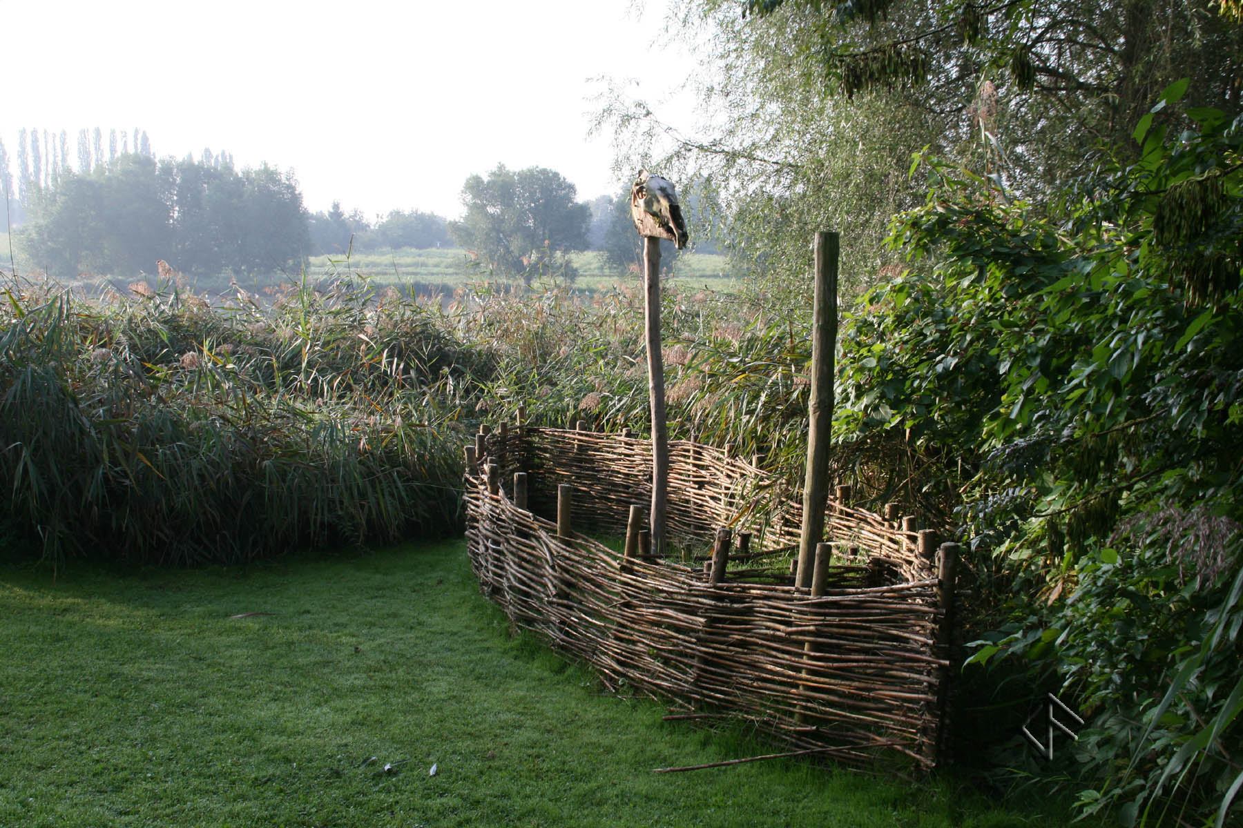 Ausstellung "Opfermoor Vogtei" - Rekonstruierte Kultstätte (Schiffsheiligtum) aus dem 5. Jh. n. Chr.